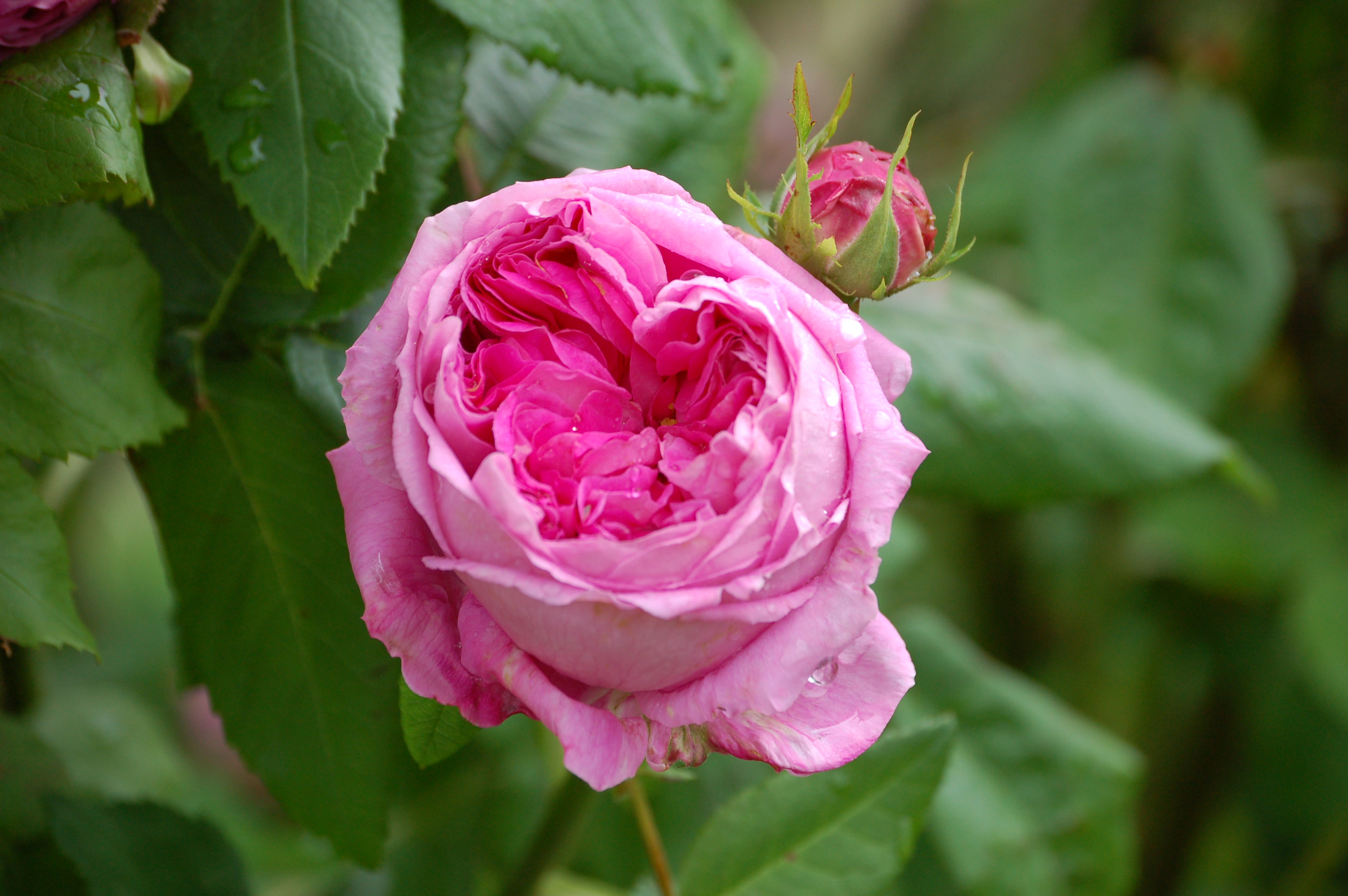 Rose „Duc de Cambridge“ (Laffay 1880) im Rosarium Uetersen, Deutschland